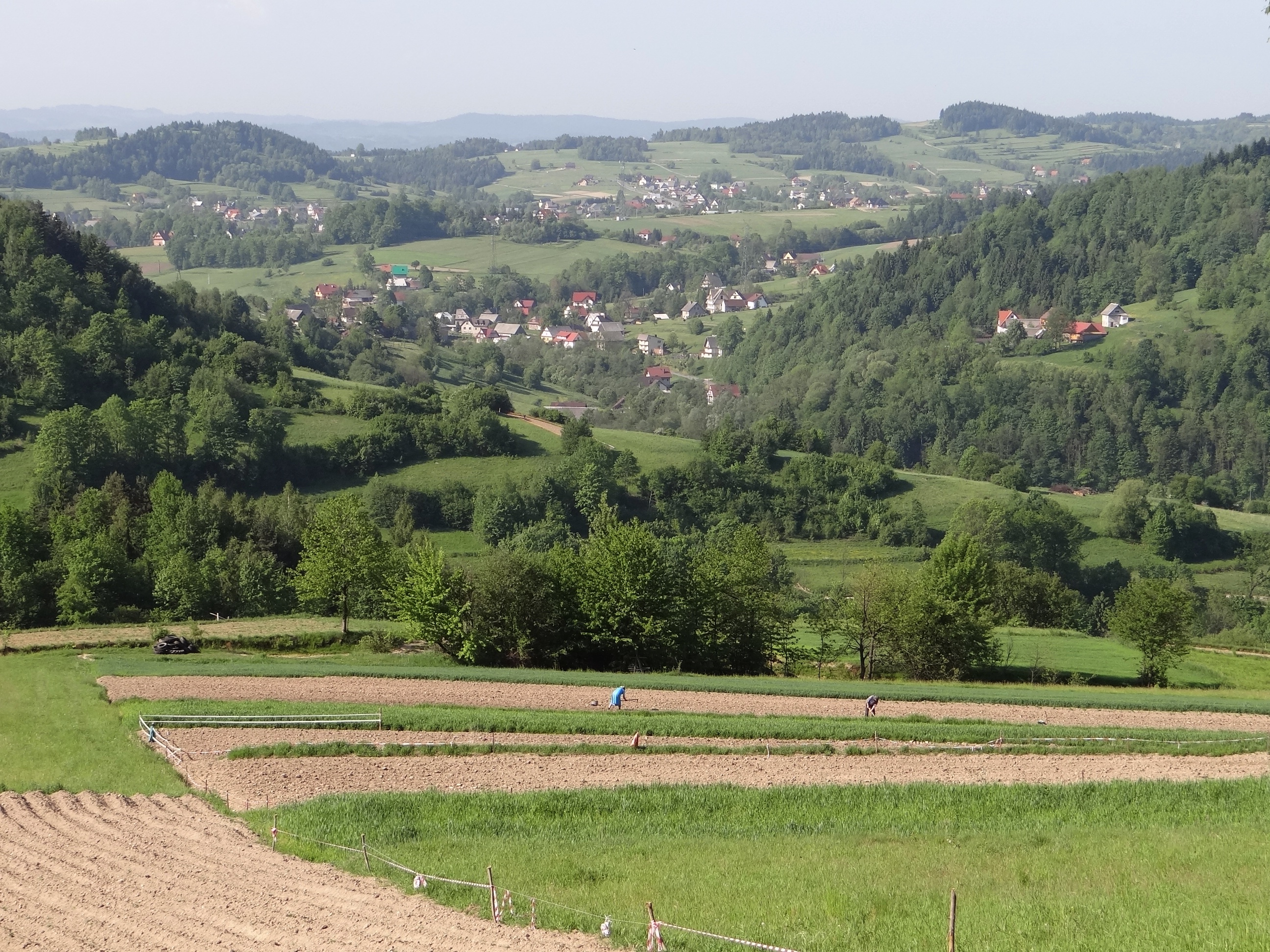 Widok z Urbaniej Góry na Łętownię